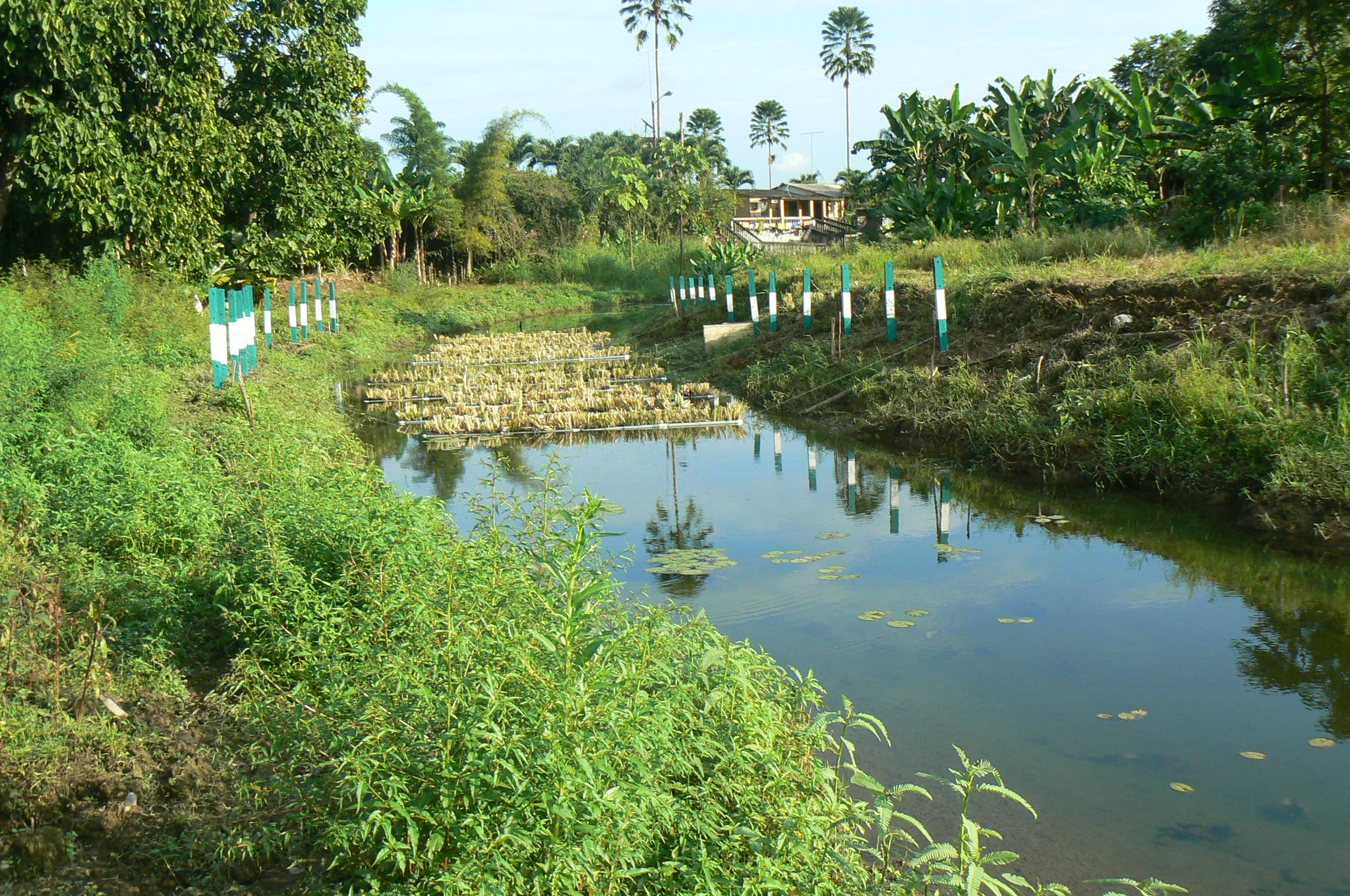 Biorremediacion tratamiento de aguas residuales con sistema vetiver